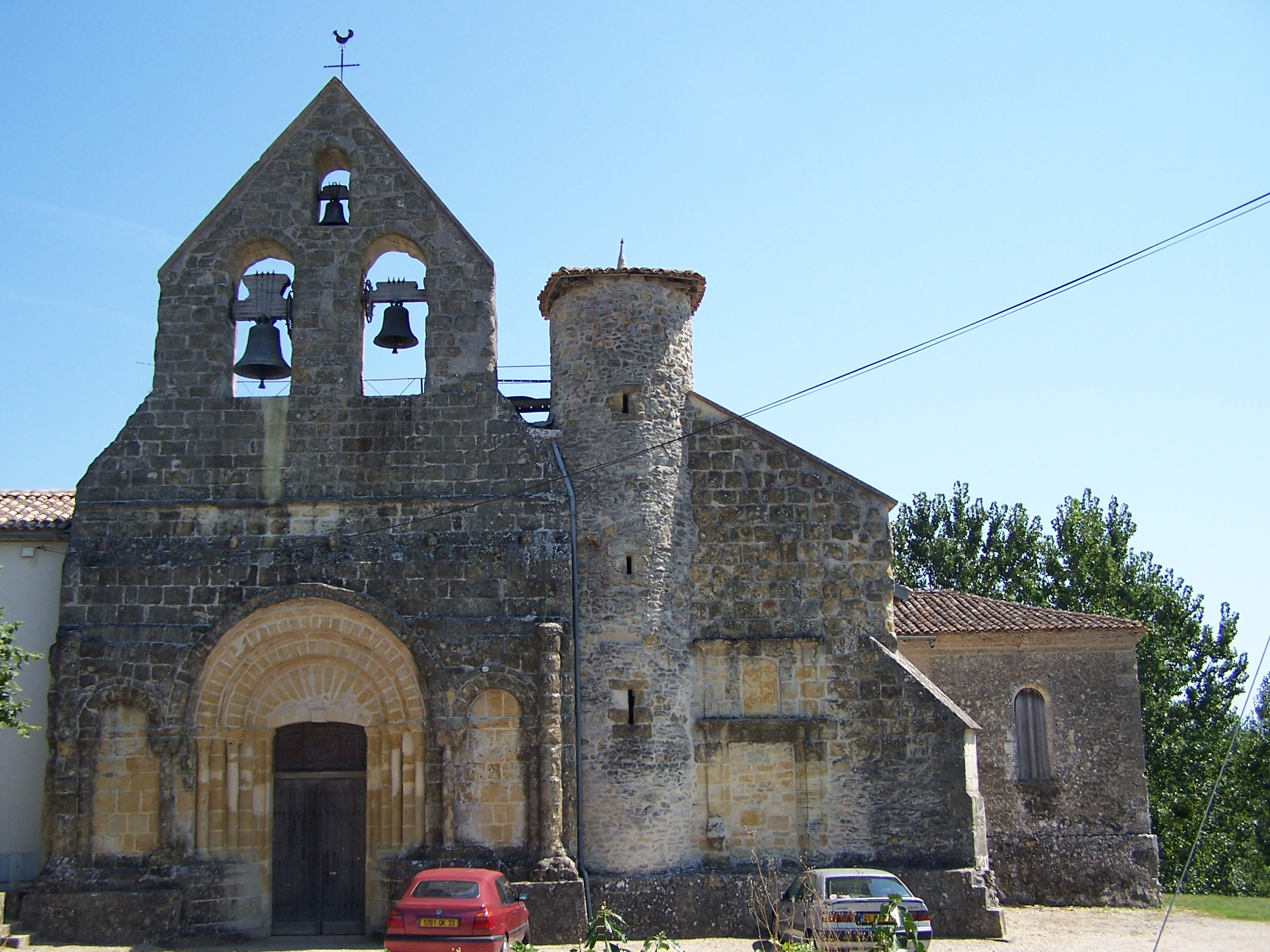 Église de Savignac, Gironde, France